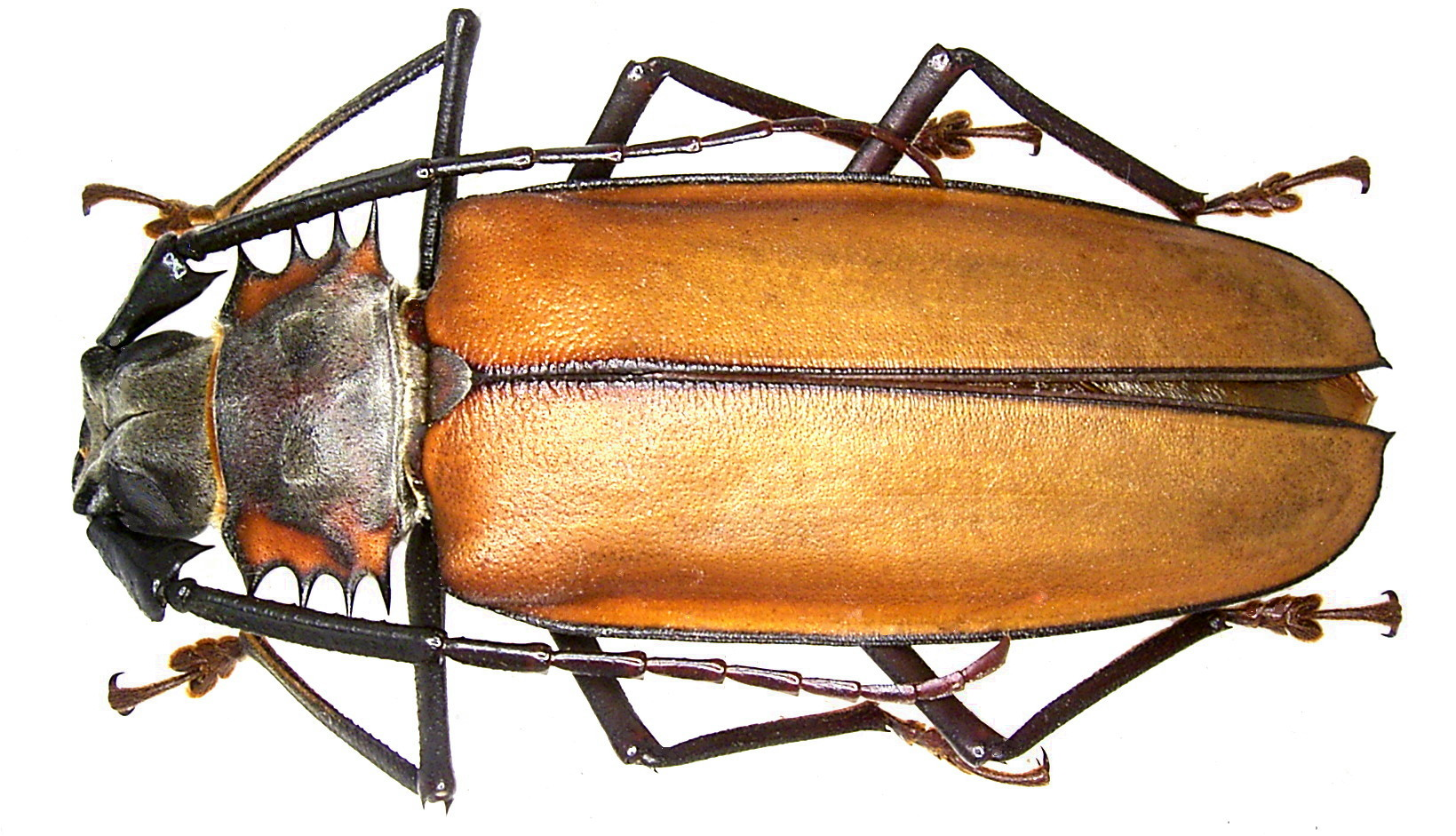 Enoplocerus armillatus Grösse: 75 mm Fundort: Peru, Dep. Loreto, Yurimaguas leg. 1997; det. U.Schmidt Foto: U.Schmidt, 2006